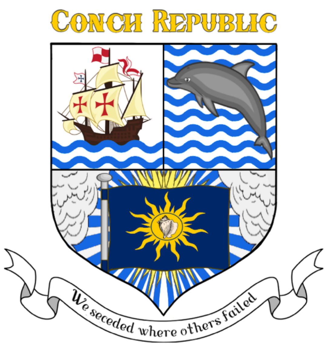 Escudo de la República de la Concha